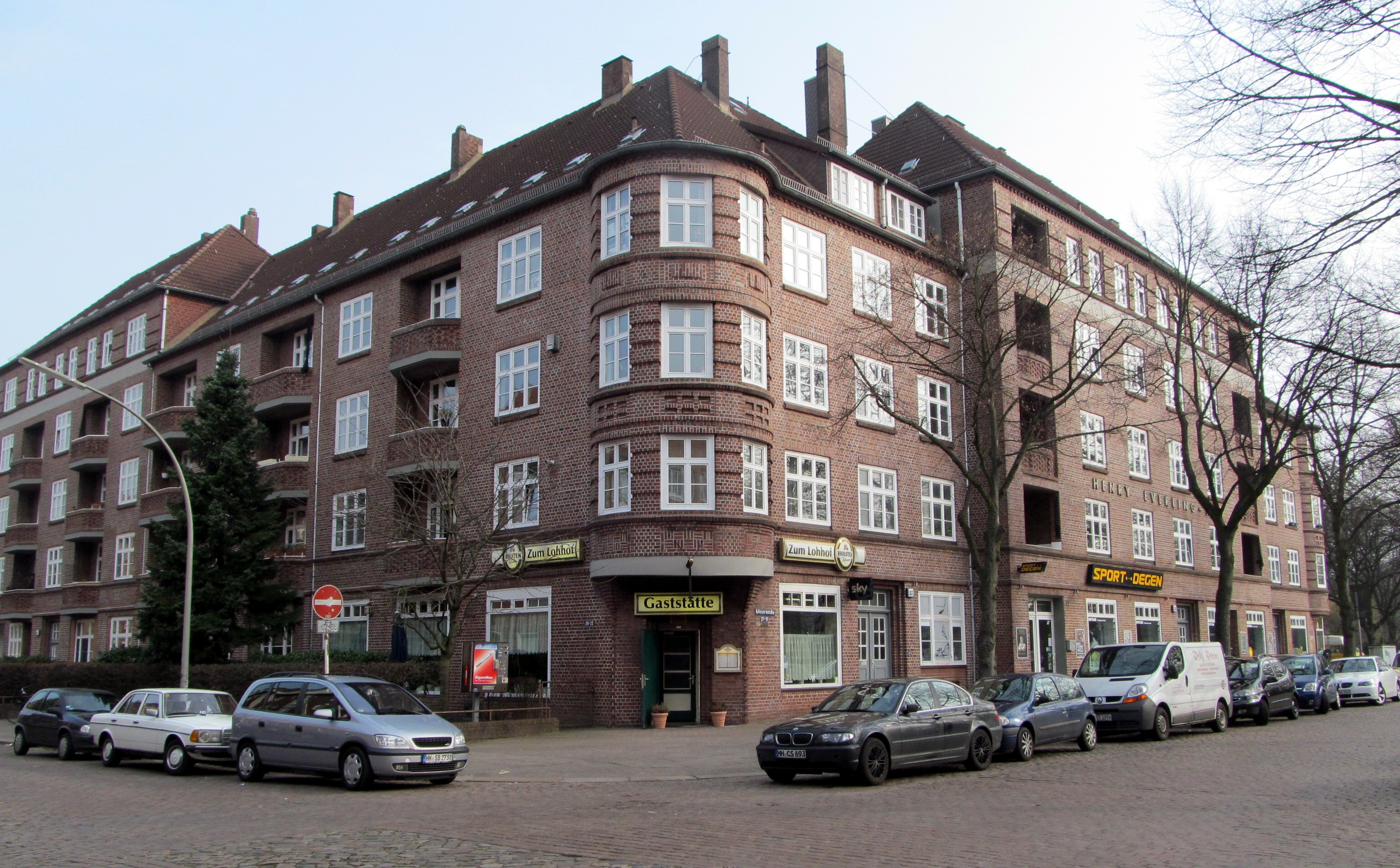 Denkmalgeschützte Wohnsiedlung "Henry-Everling-Hof" in Hamburg-Hamm, erbaut 1925 von G. Lehne, Ansicht Moorende/Ecke Lohhof This is a photograph of an architectural monument.